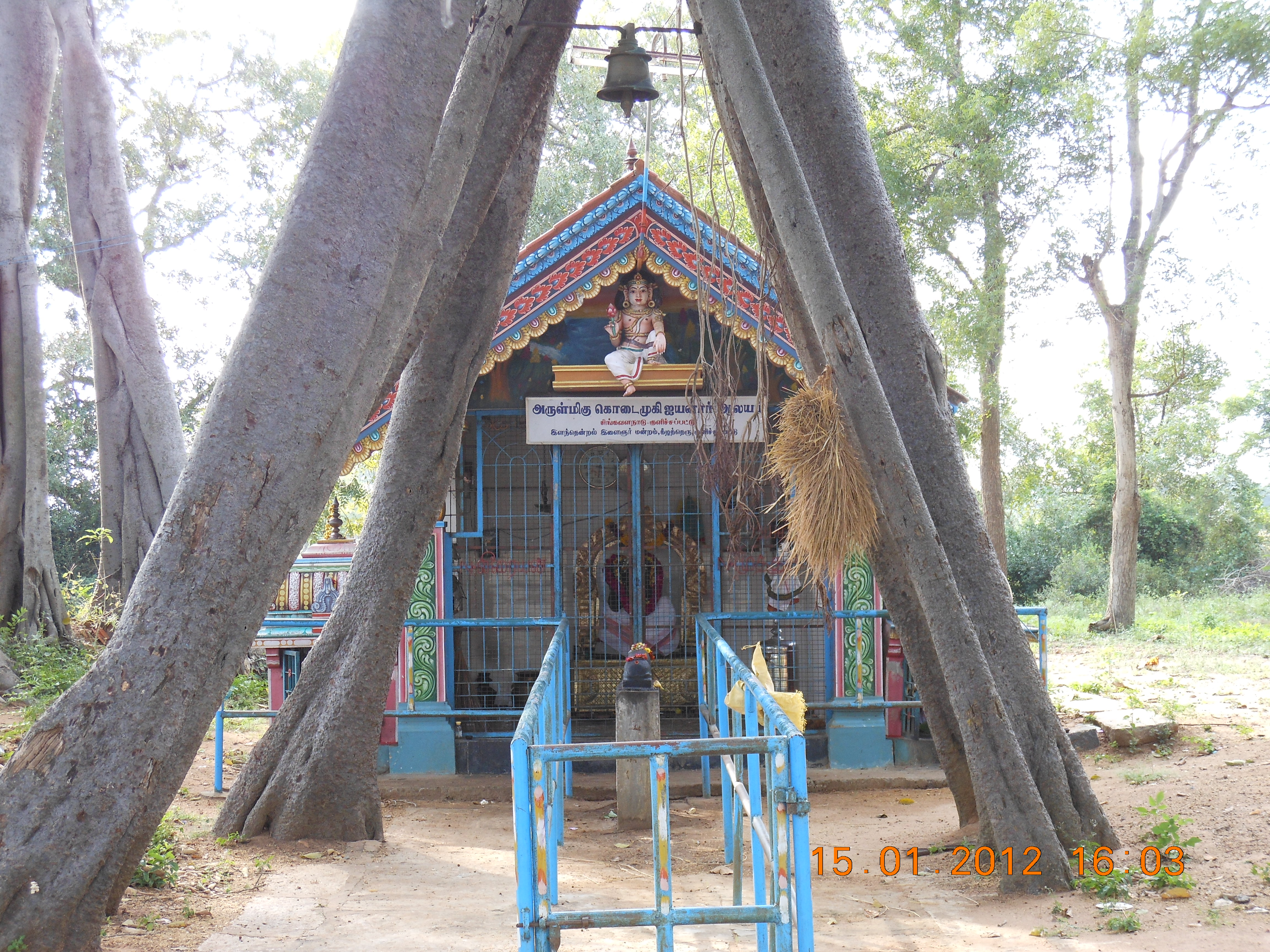 கொடைமுகி அய்யனார் ஆலயம்